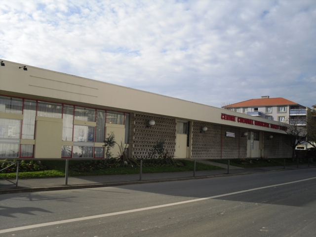 Le centre culturel municipal Sidney Bechet de Grigny (Essonne, Île-de-France, France).